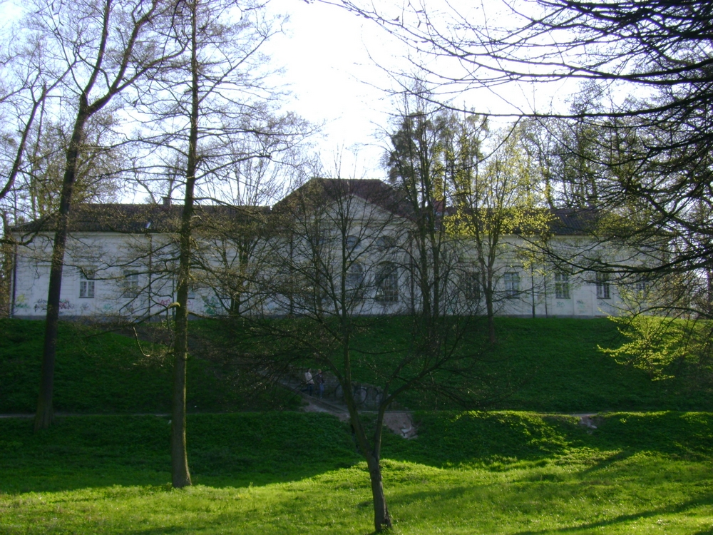 Lidzbark Warmiński, ul. Krasickiego 2 - letni pałac biskupi "Oranżeria", barokowo-klasycystyczny pawilon ogrodowy (zabytek nr A-448 z 17.12.1957 i 476 [L/33])